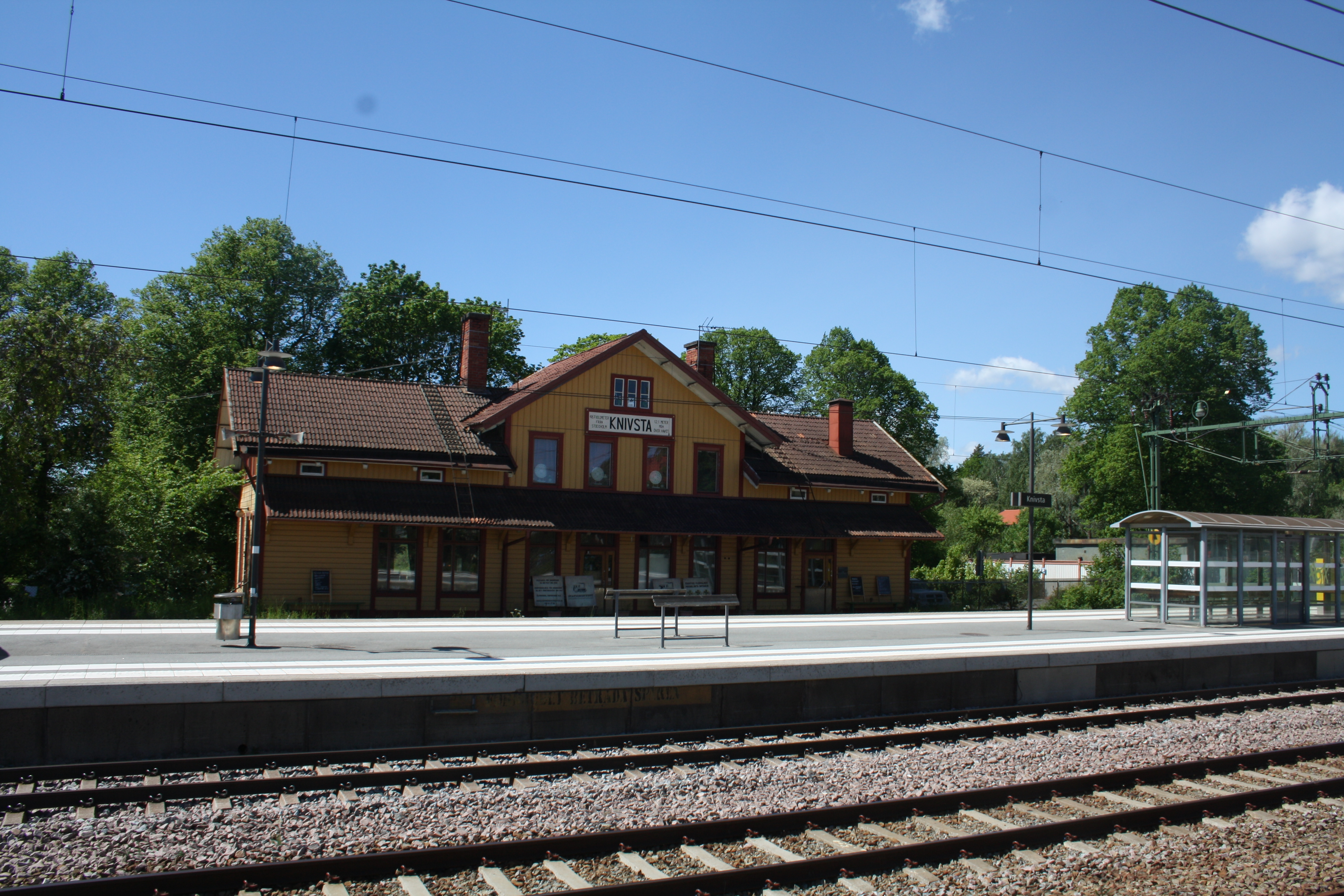 Knivsta station